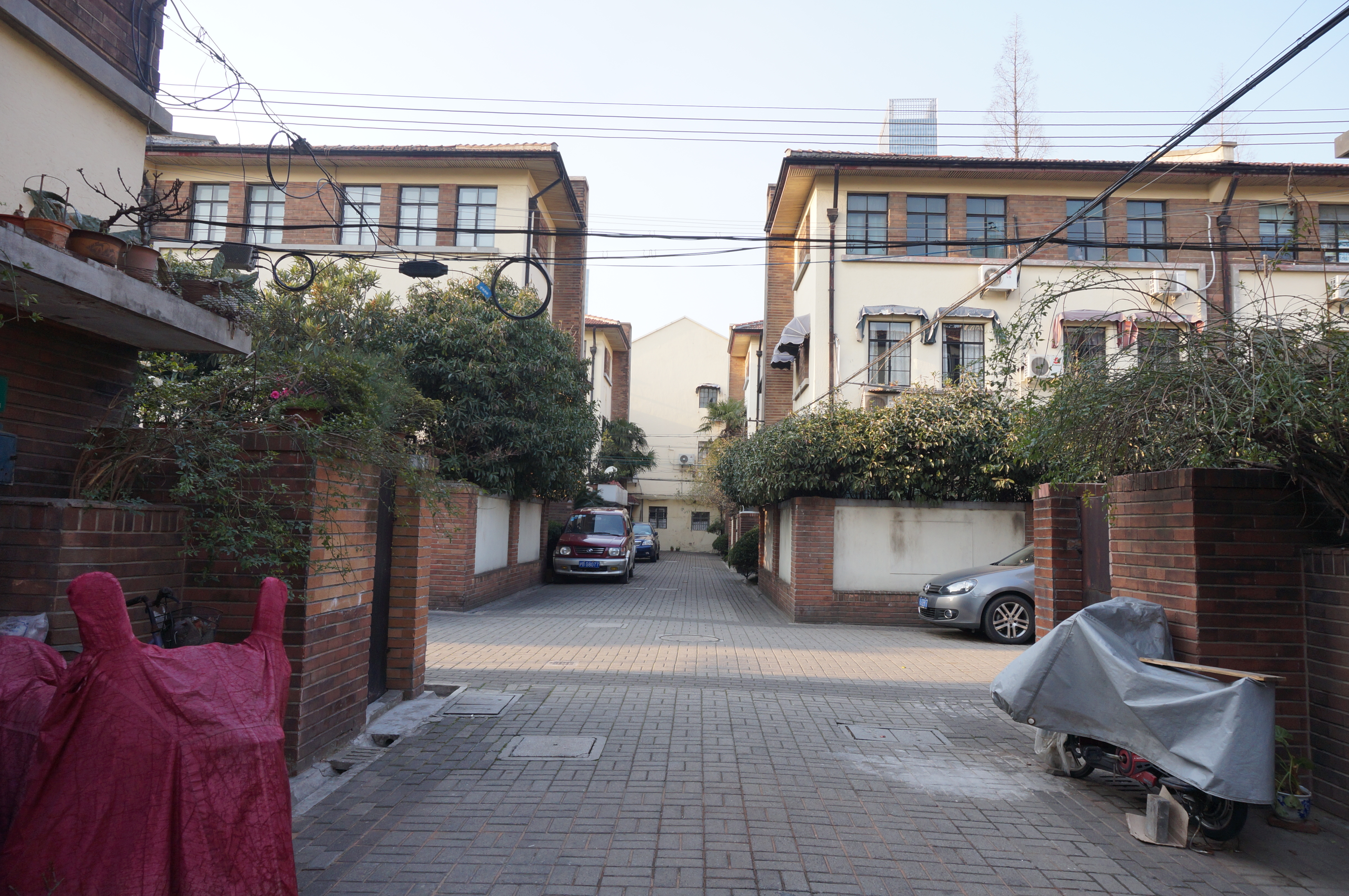 上海裕华新村